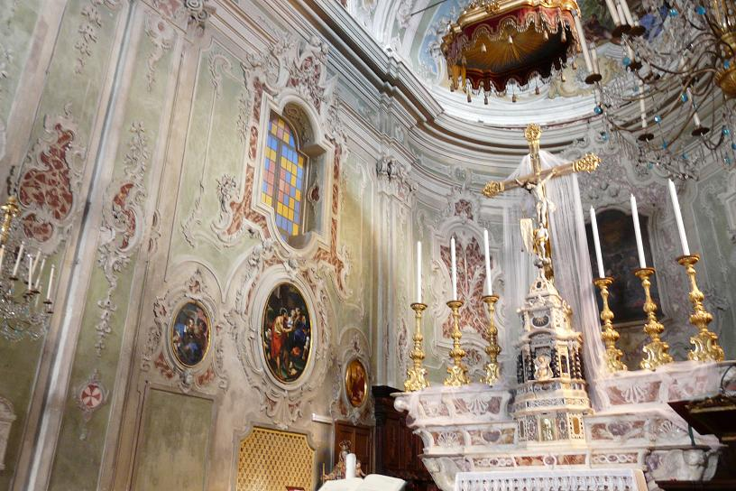 Chiesa parrocchiale di San Giovanni Battista, Cervo (IM), Liguria, Italia